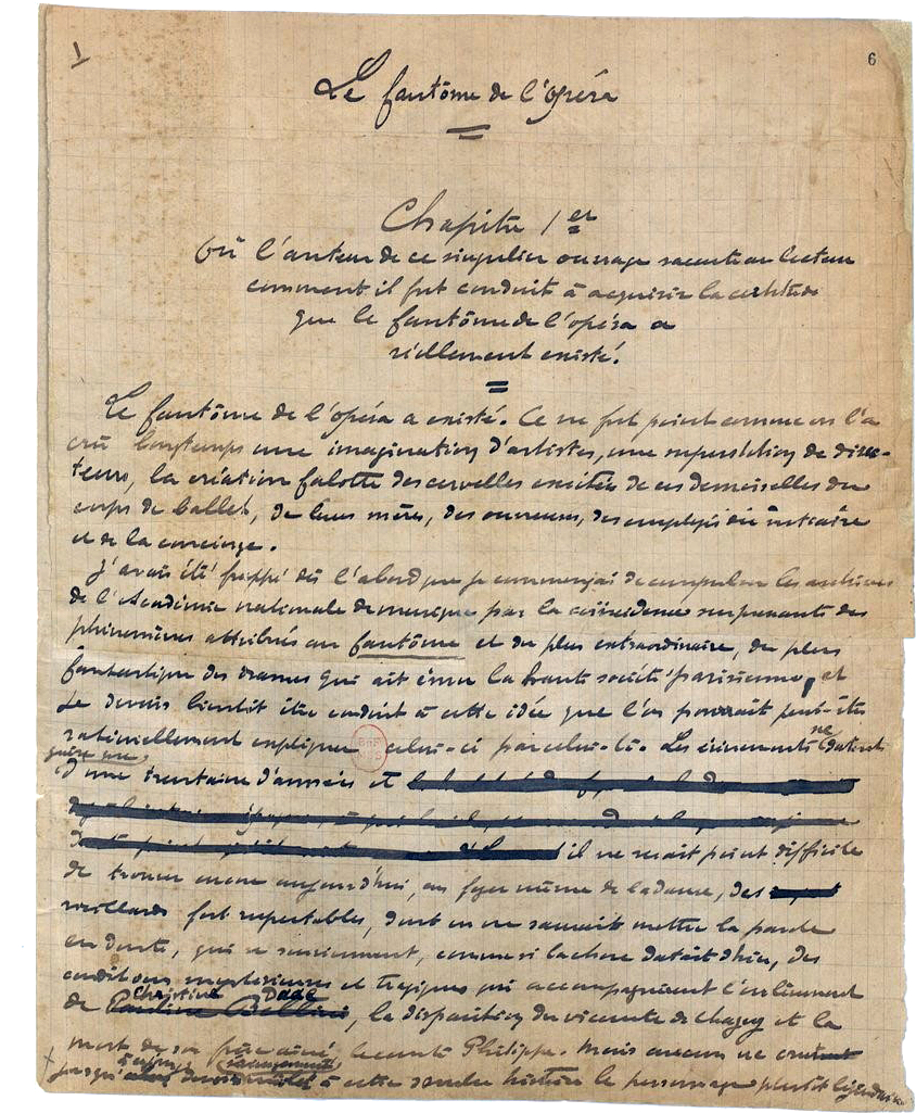 Première page du manuscrit autographe.